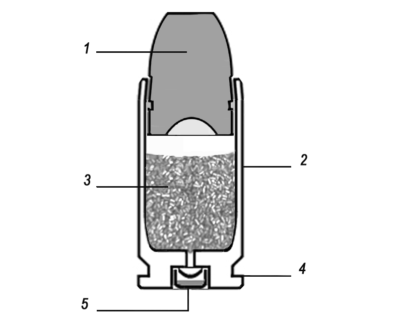 Boxerpatrone Schnittbild